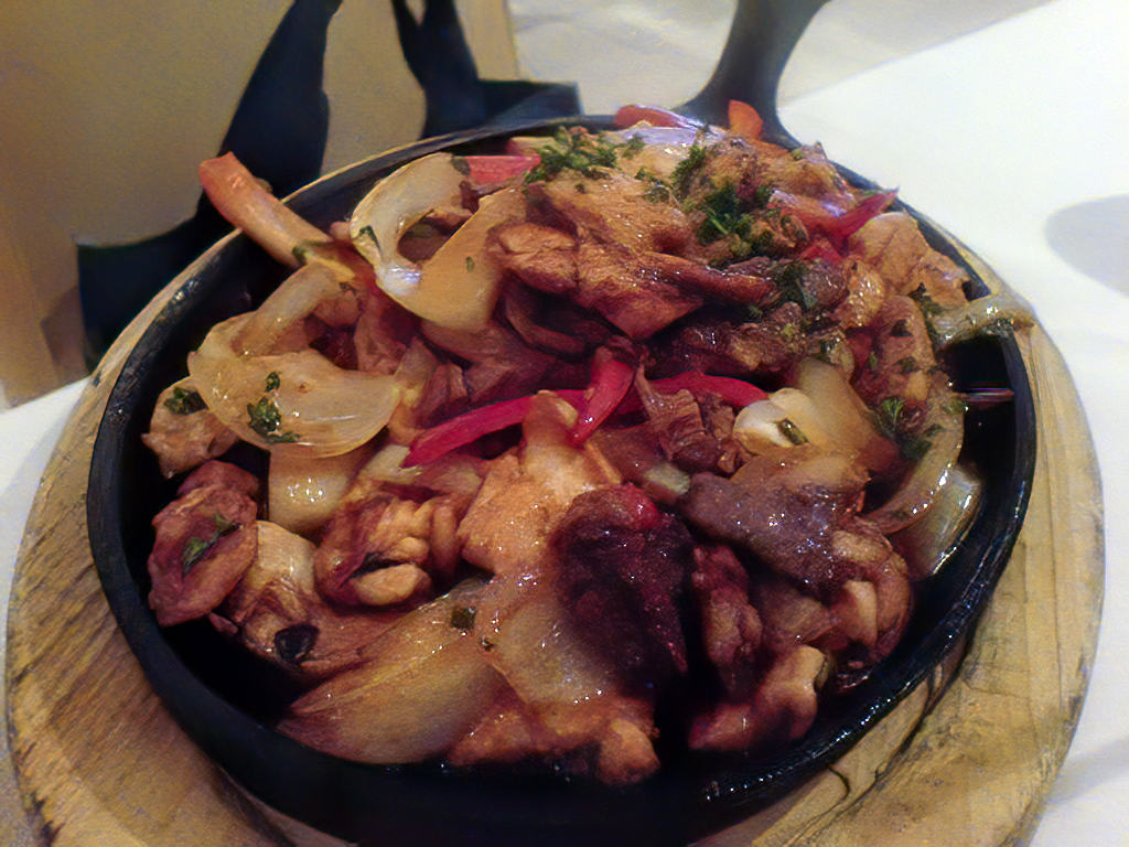 Fajitas en El Tizón